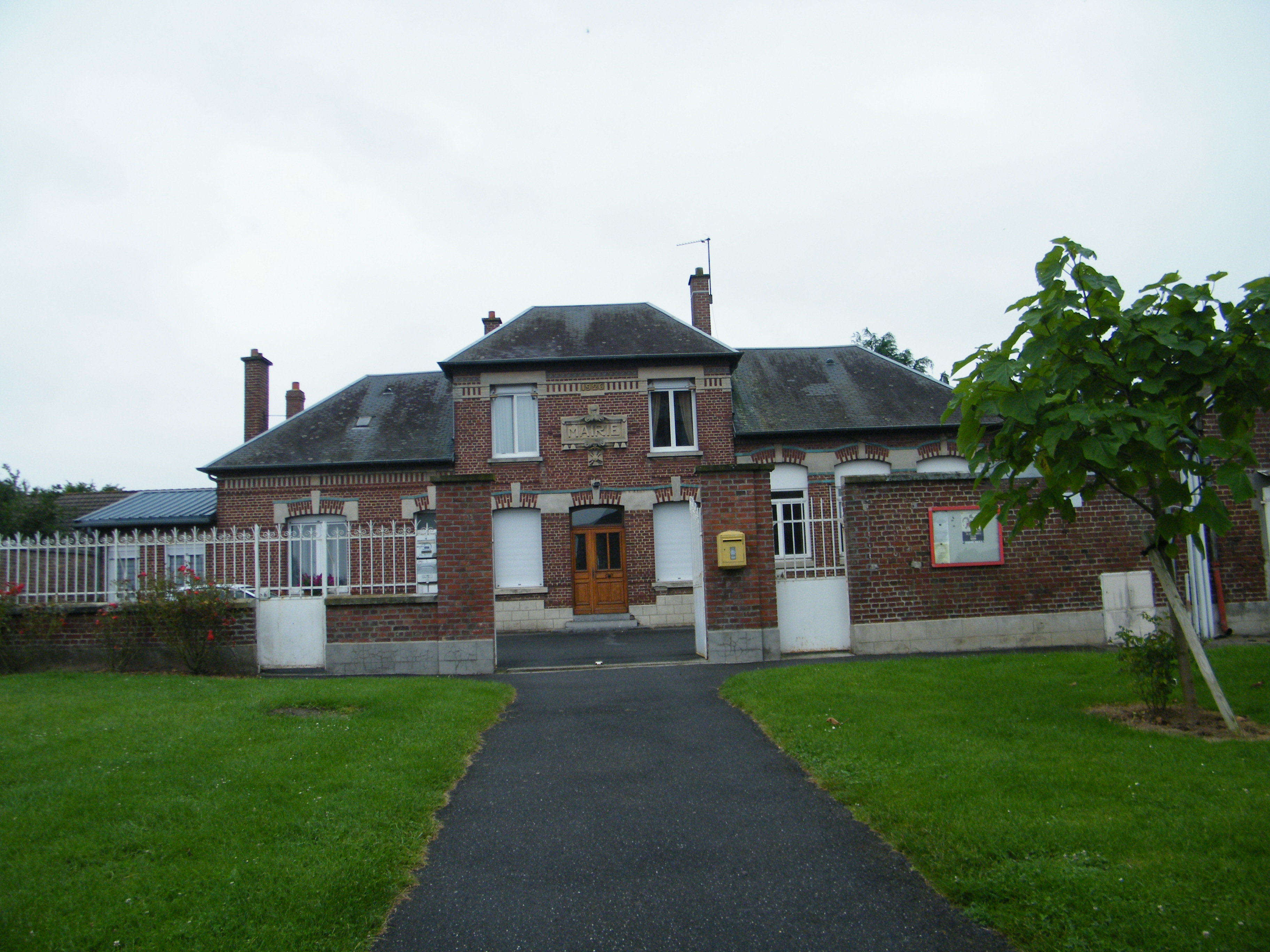 Mairie.